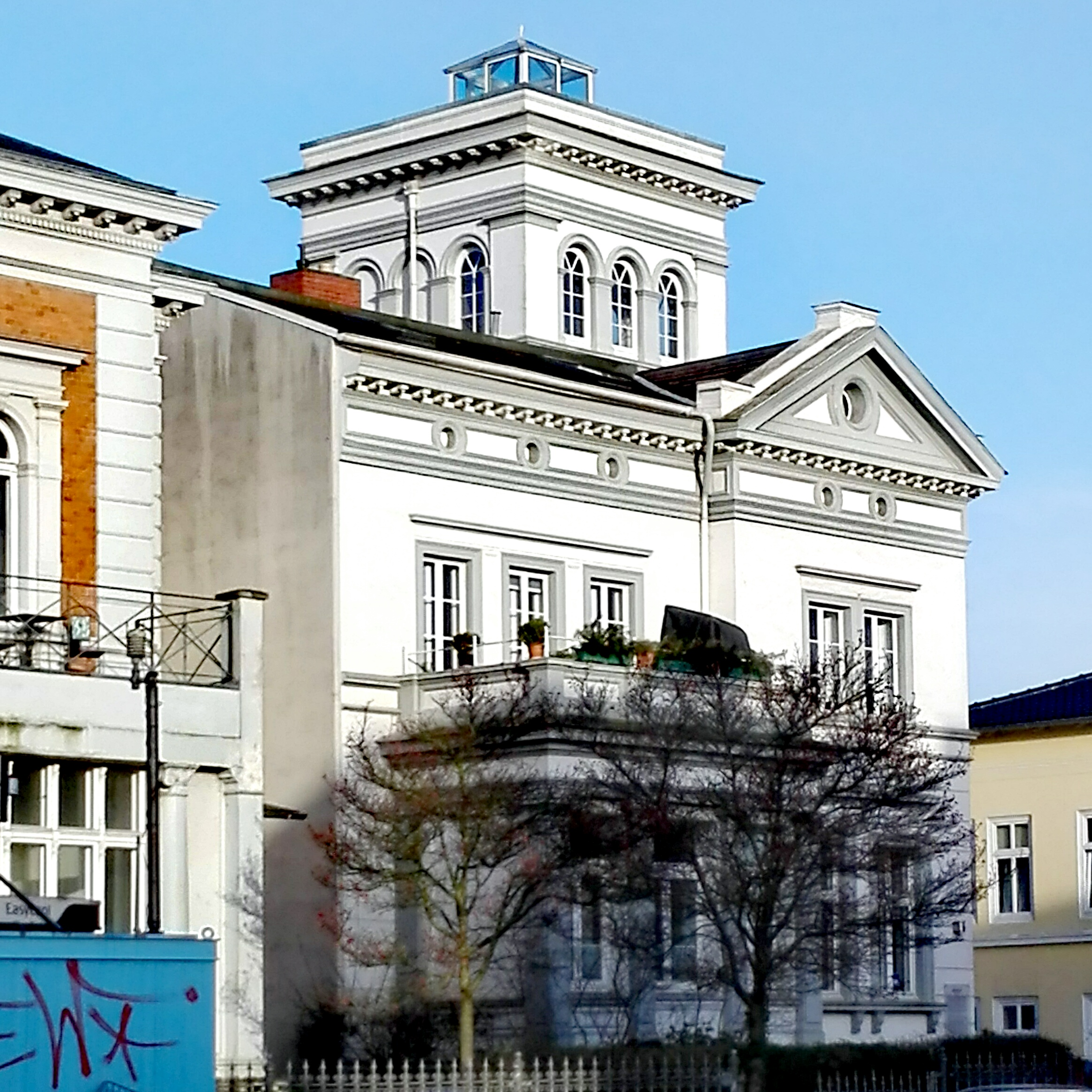 Moislinger Allee 22